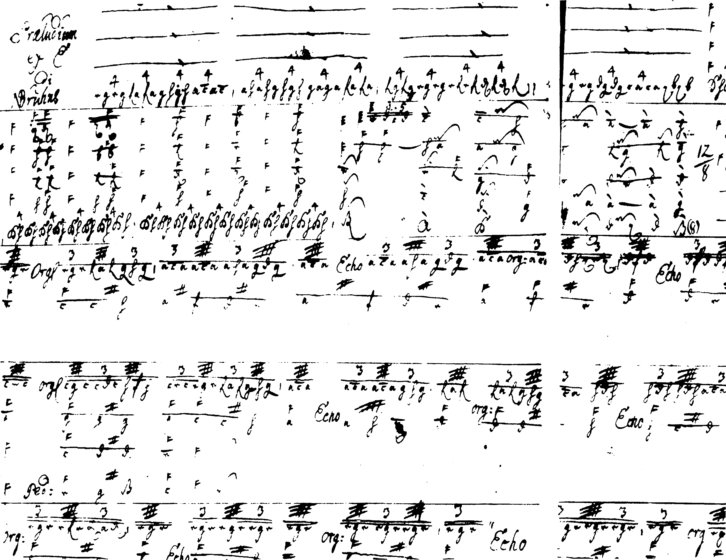 Manuskript des Präludiums in e von Nicolaus Bruhns.